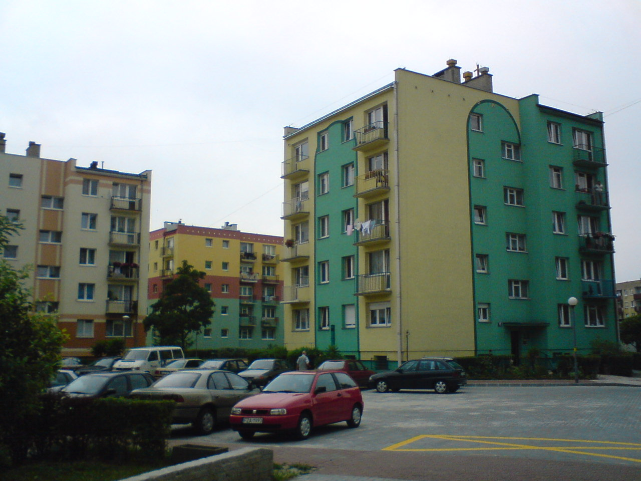 Osiedle Moniuszki (Wieniawskiego Str.), Żary